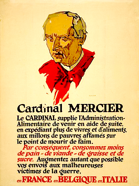 World War I Poster. Appeal to Food Administration by Belgian cardinal Désiré-Joseph Mercier (1851-1928). Text : "Cardinal Mercier. Le Cardinal supplie l'Administration Alimentaire de venir en aide de suite, en expédiant plus de vivres et d'aliments, aux millions de pauvres affamés sur le point de mourir de faim. Par conséquent, consommez moins de pain, de viande, de graisse et de sucre. Augmentez autant que possible vos envois aux malheureuses victimes de la guerre, en France, en Belgique, en Italie."